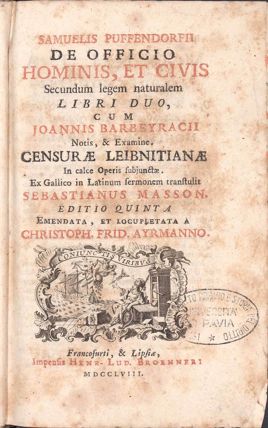 Frontespizio